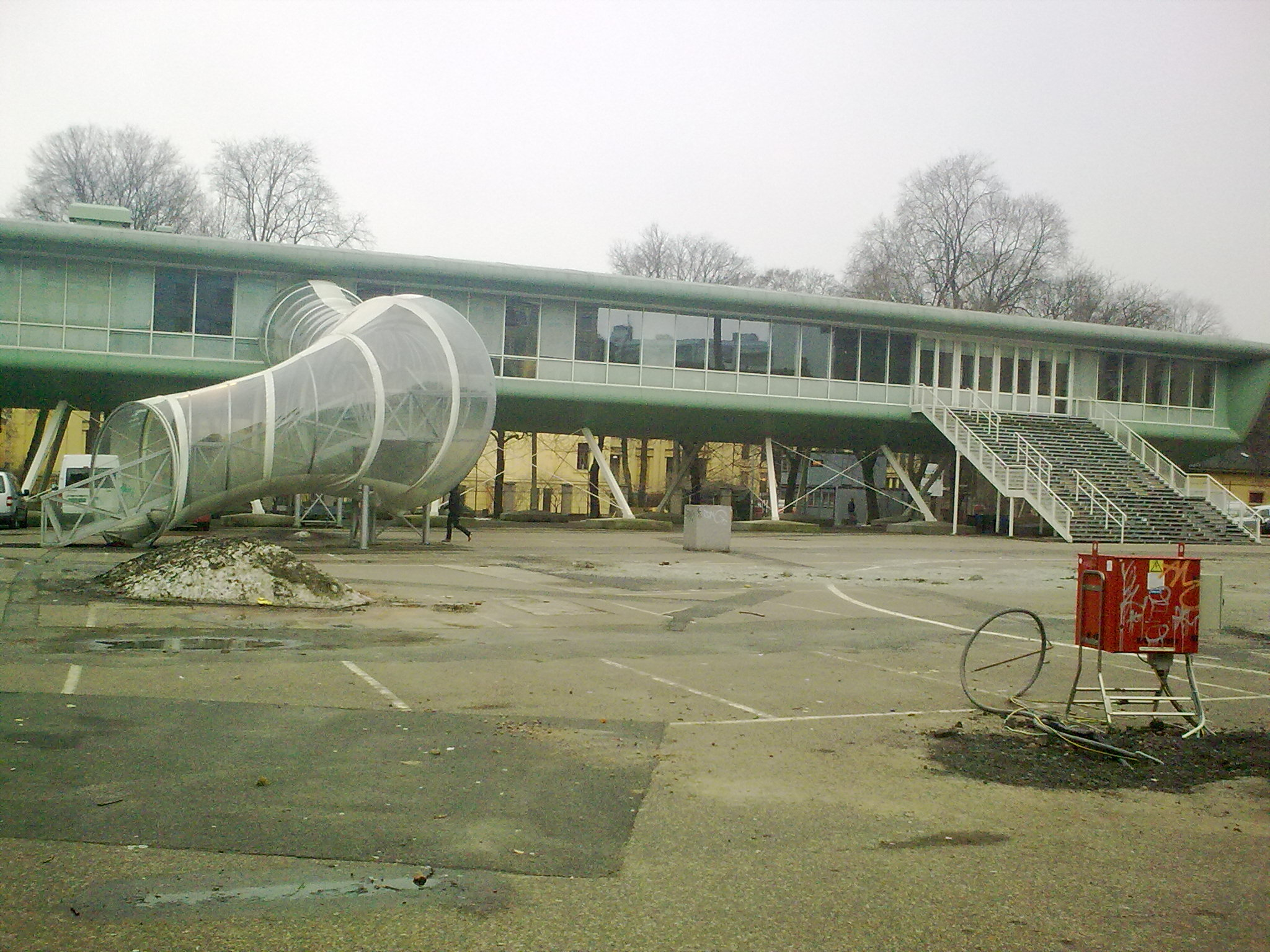 Tullinløkka i Oslo